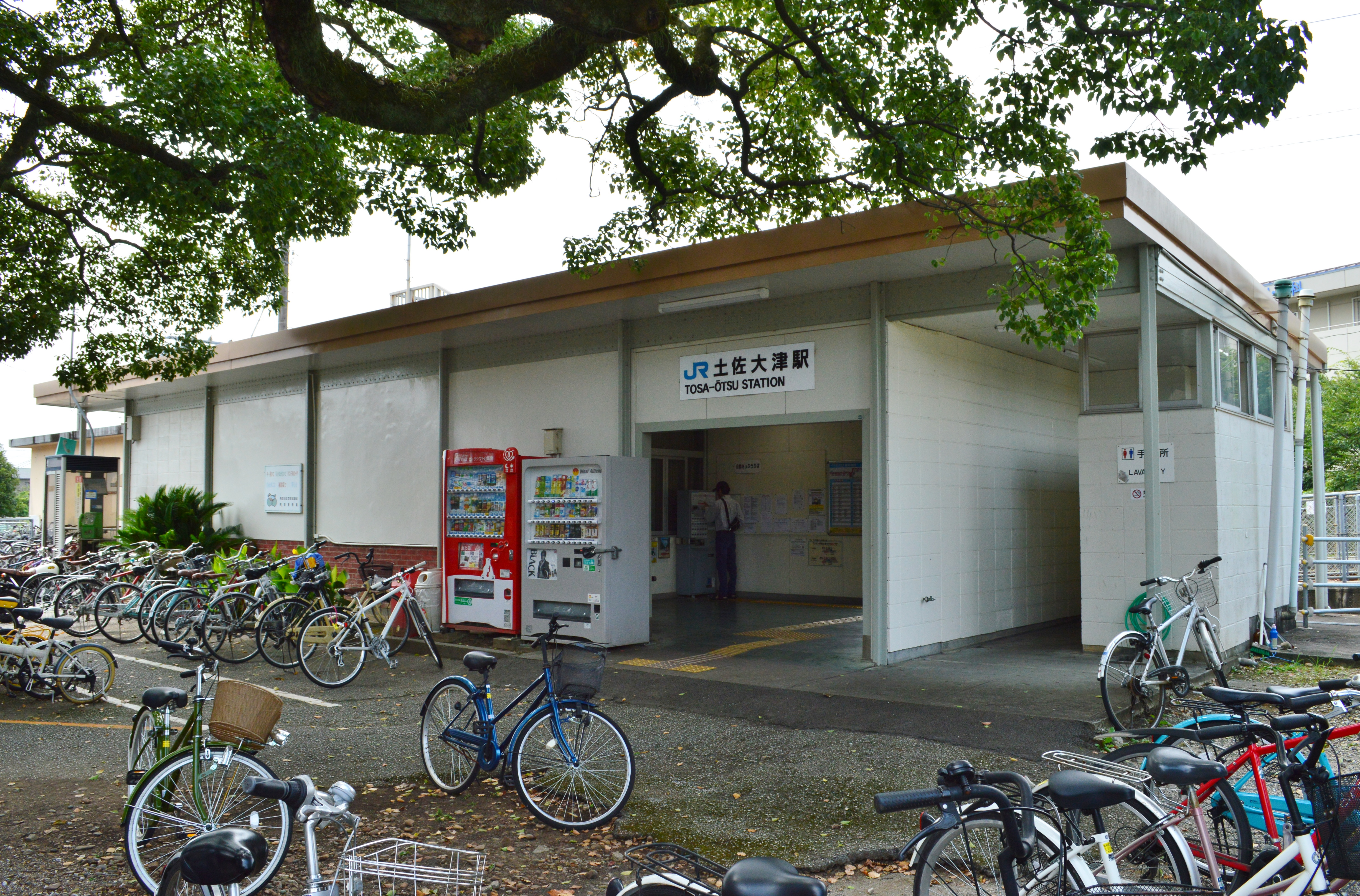 土佐大津駅 駅舎